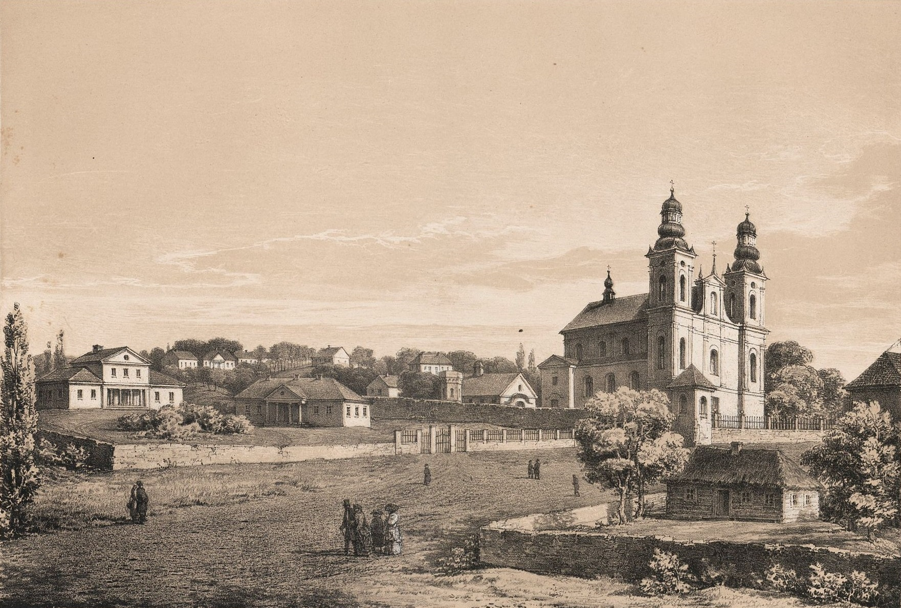 Костел Мурафа Наполеон Орда